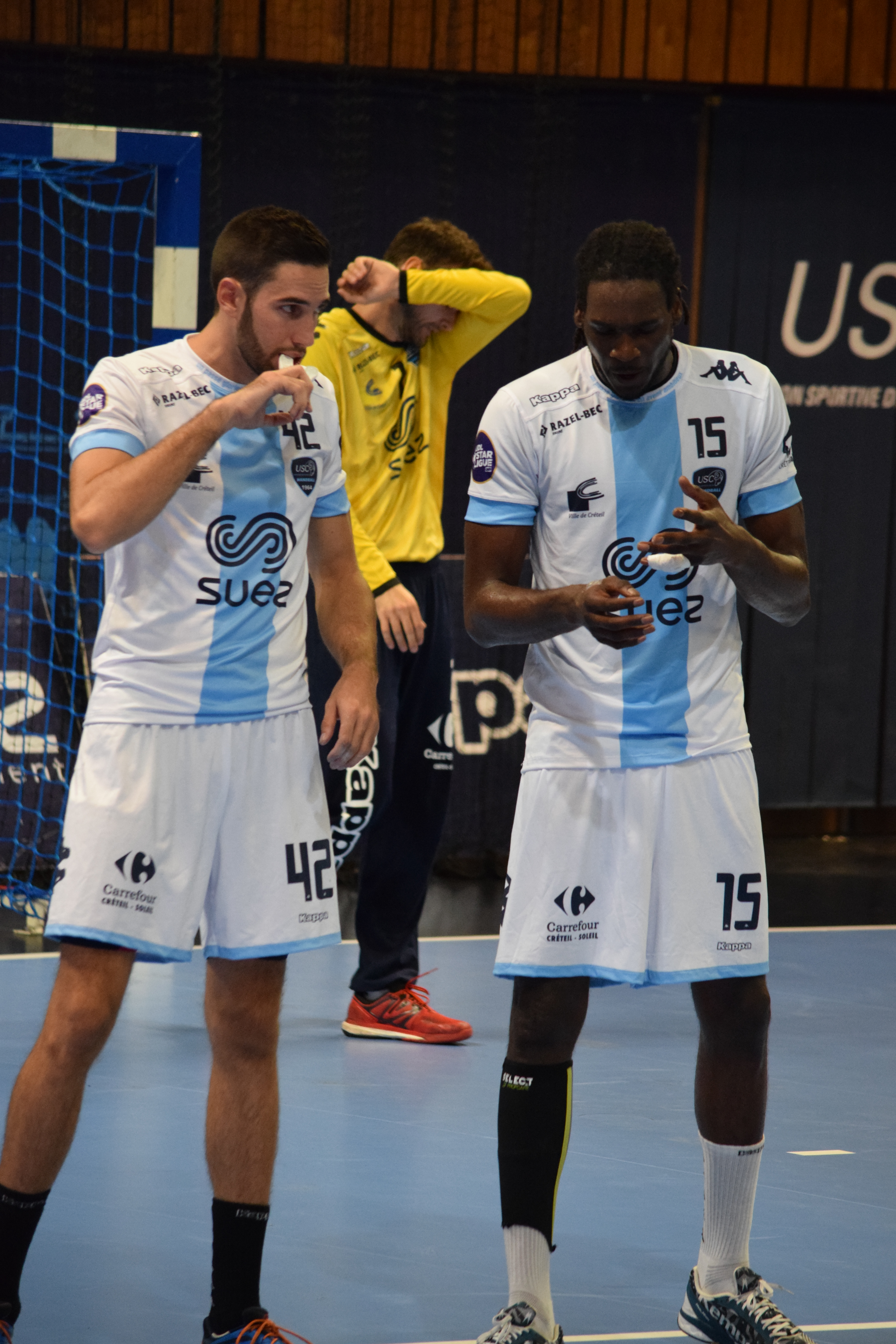 Match aller du premier tour de la coupe européenne EHF. Défaite de Créteil à domicile 29 - 32